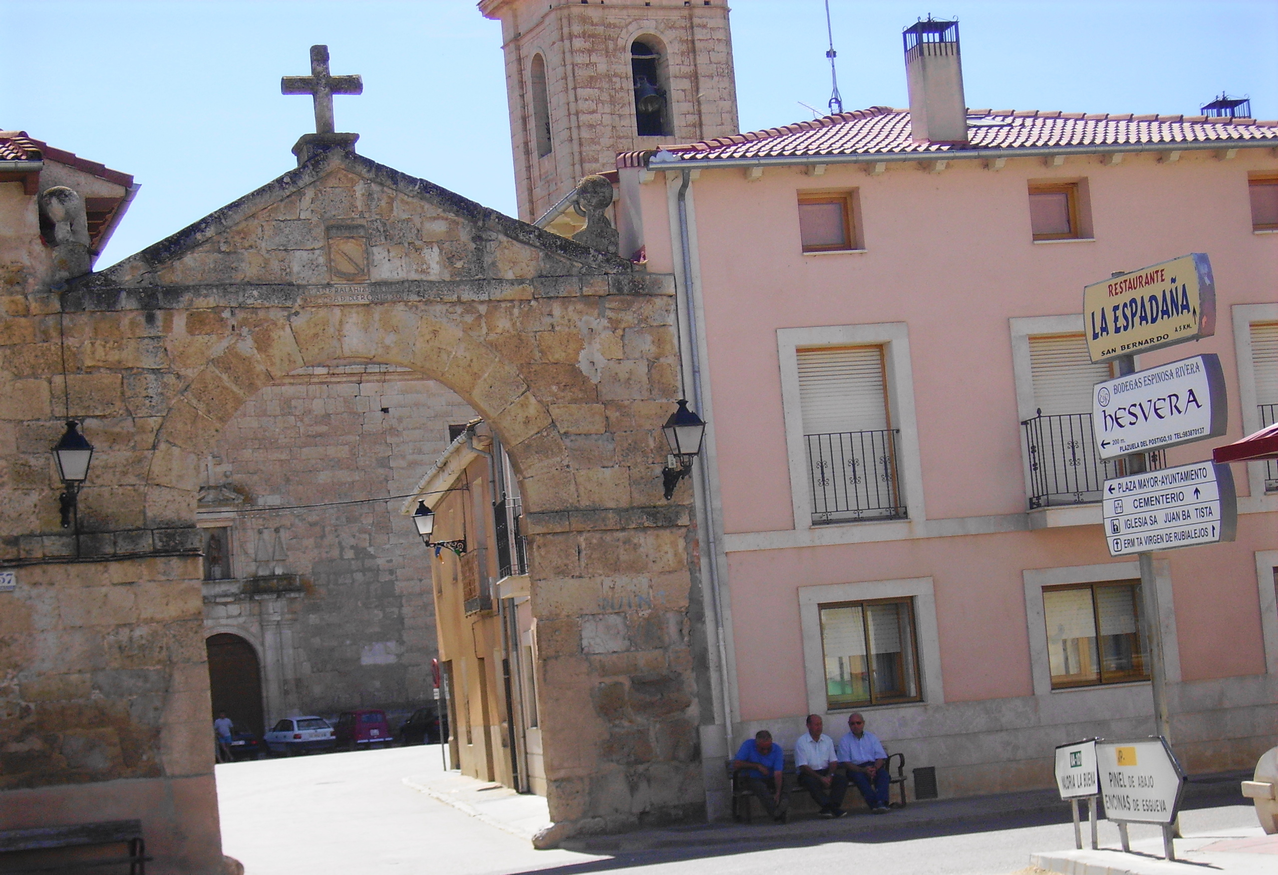 escudo en la parte superior